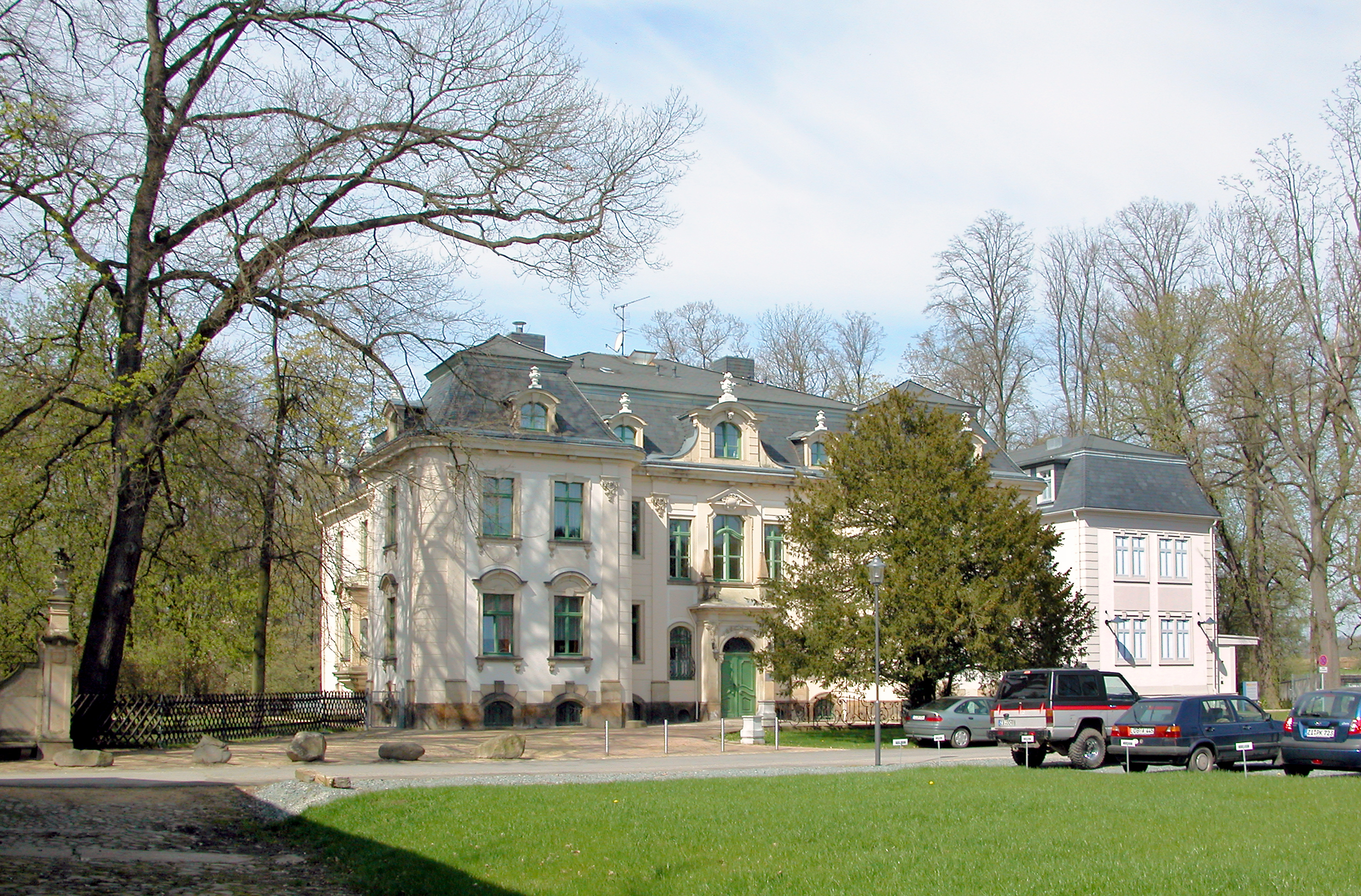 28.04.2008 02742 Friedersdorf (Neusalza-Spremberg) Am Pflegeheim 4: Schloß Friedersdorf, heute Seniorenheim ASB-Pflegeheim. Auf dem Niederfriedersdorfer Gut von 1887-89 unter Hans Leo von Oppell nach Plänen des Architekt Heinrich Schubert erbaut. In der DDR war es bis 1957 Schulungsheim der CDU und seit 1961 Altersheim. Seit der Wende führt der Arbeiter-Samariter-Bund Löbau das Seniorenheim. [DSCN32491.TIF]20080428300DR.JPG(c)Blobelt